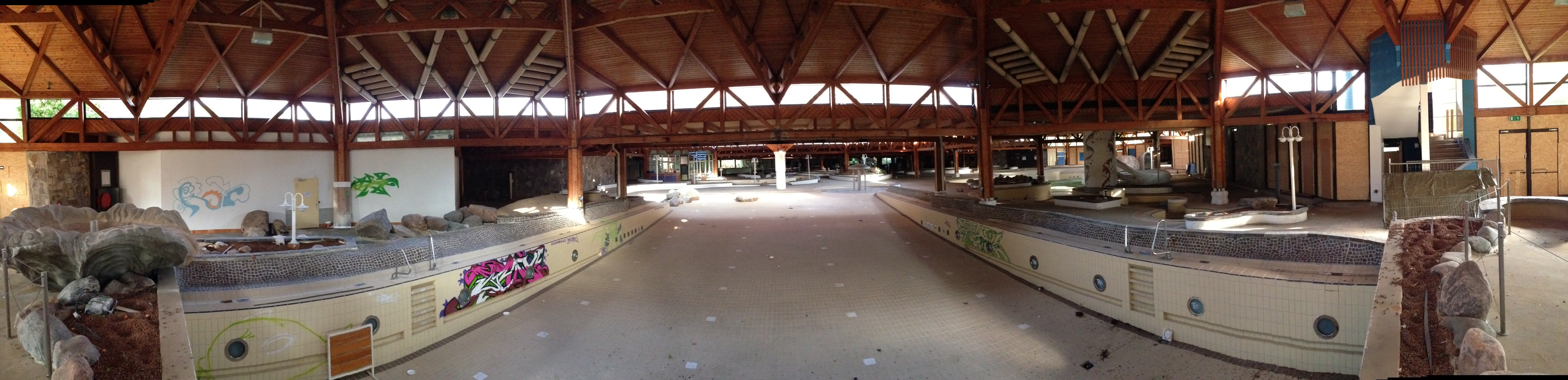 Berliner Luft- und Badeparadies im Jahr 2013